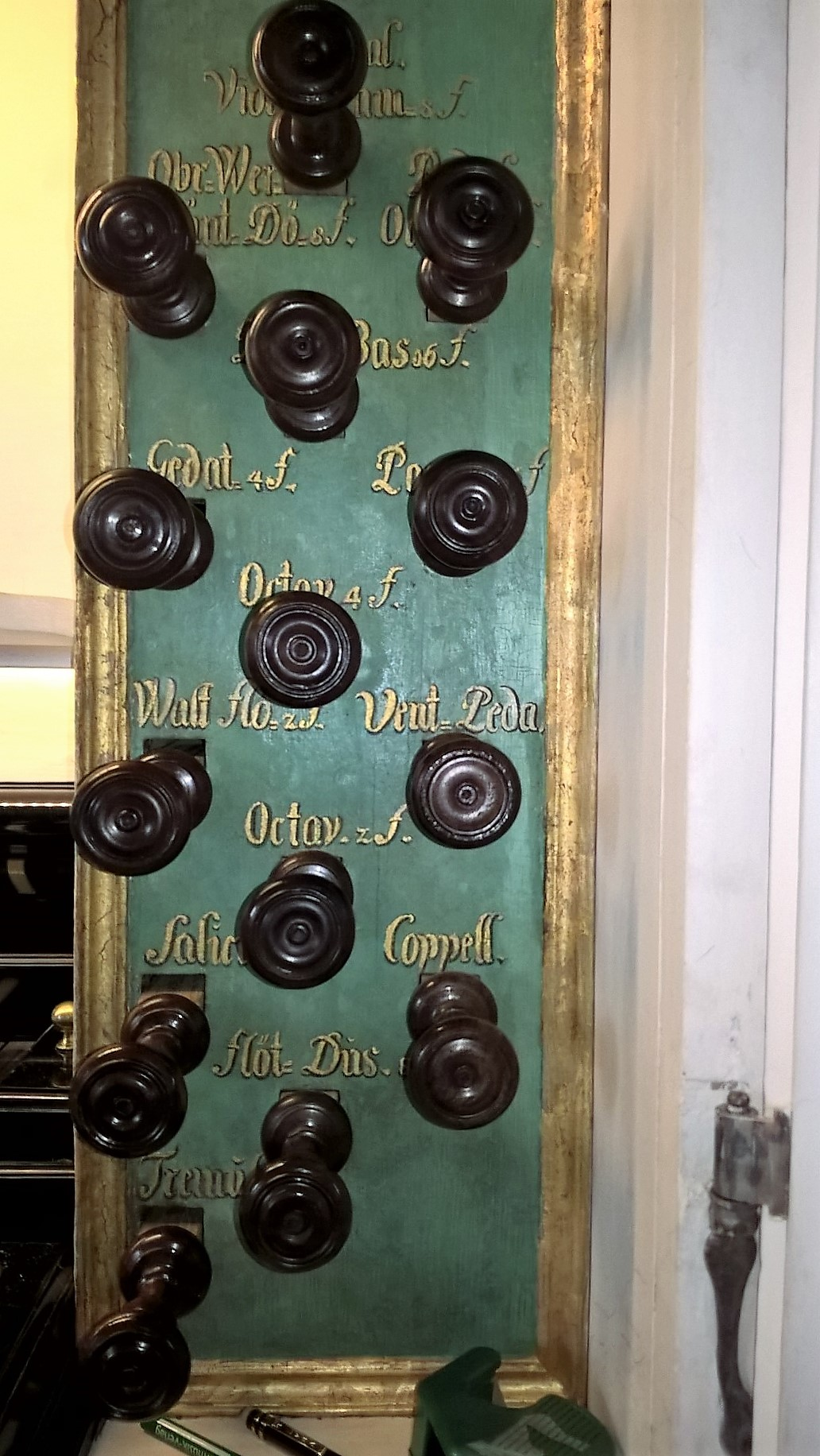 Orgel der Kirche Zur Frohen Botschaft, Berlin-Karlshorst, Deutschland